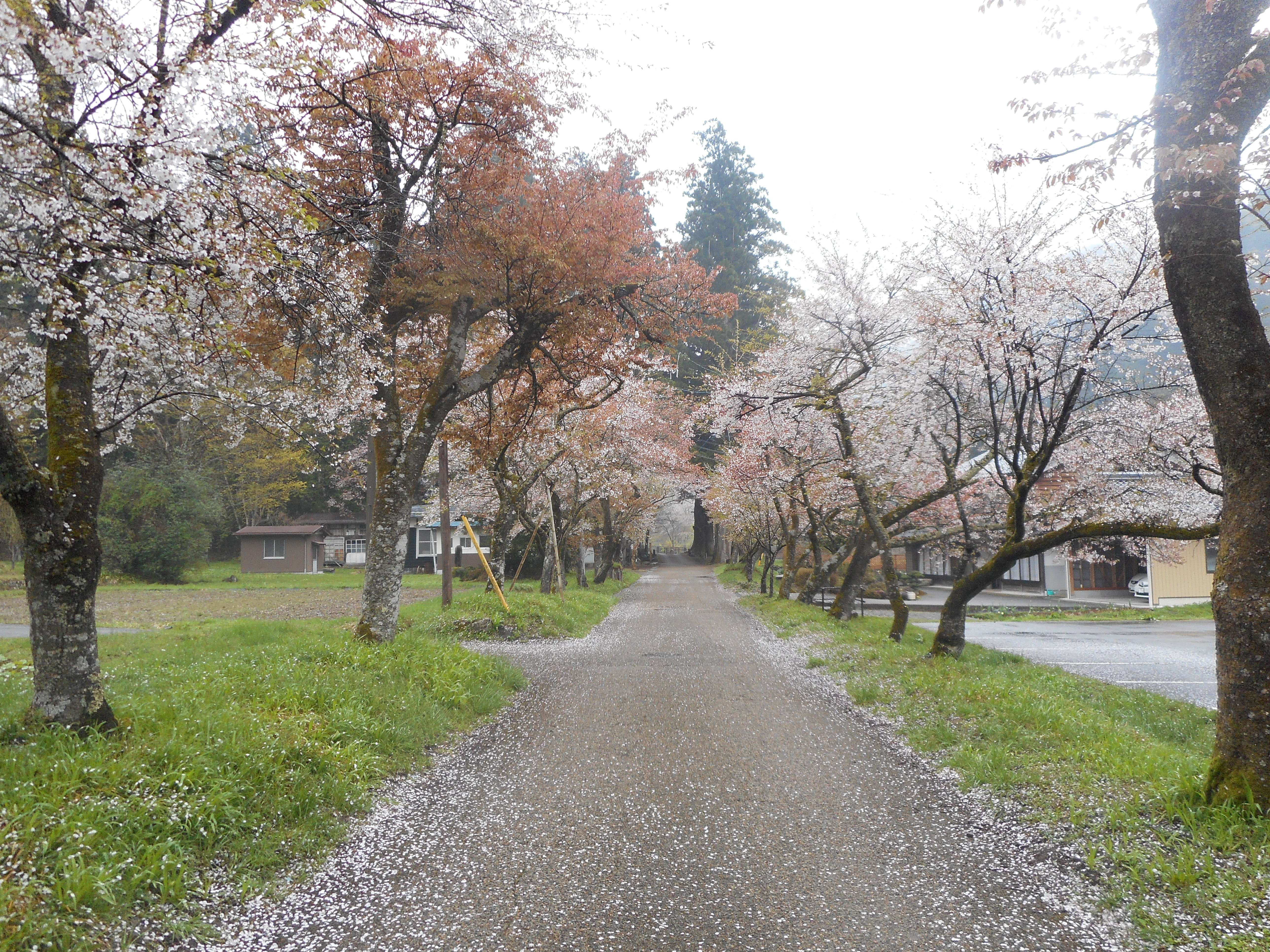 郡上市大和町妙建神社の桜並木